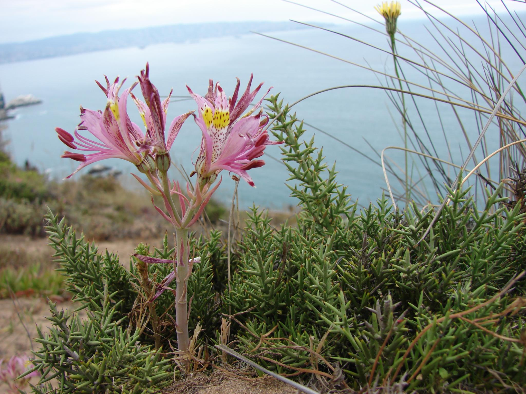 Dunas de Concon